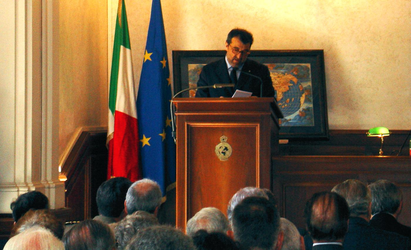 Il Prof. Franco Salvatori, presidente della Societa geografica italiana, nel discorso di apertura delle celebrazioni per il 140° anniversario della fondazione del sodalizio. Roma, Palazzetto Mattei, Villa Celimontana, 12 maggio 2007. h 12:15 circa